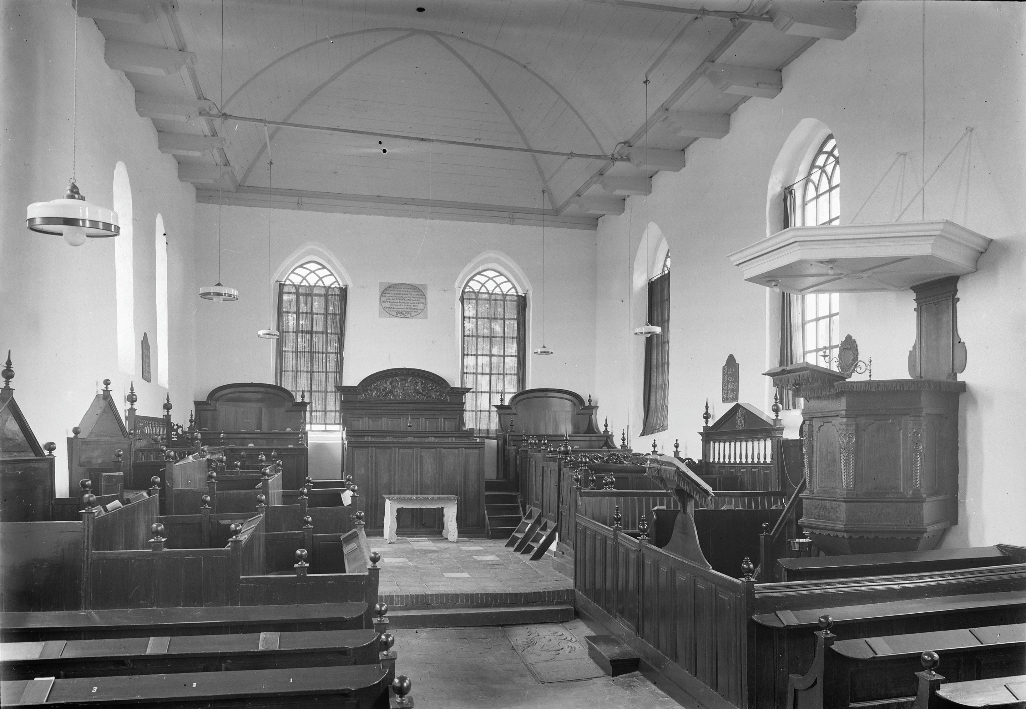 Nederlands Hervormde Kerk: interieur naar het westen en naar het oosten